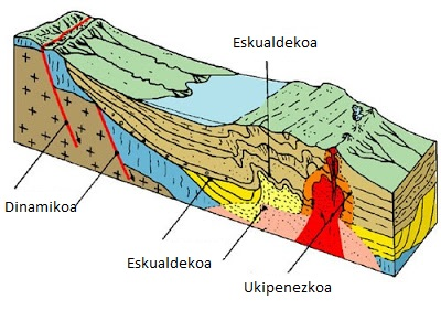 Metamorfismo dinamikoa, ukipenezkoa eta eskualdekoa